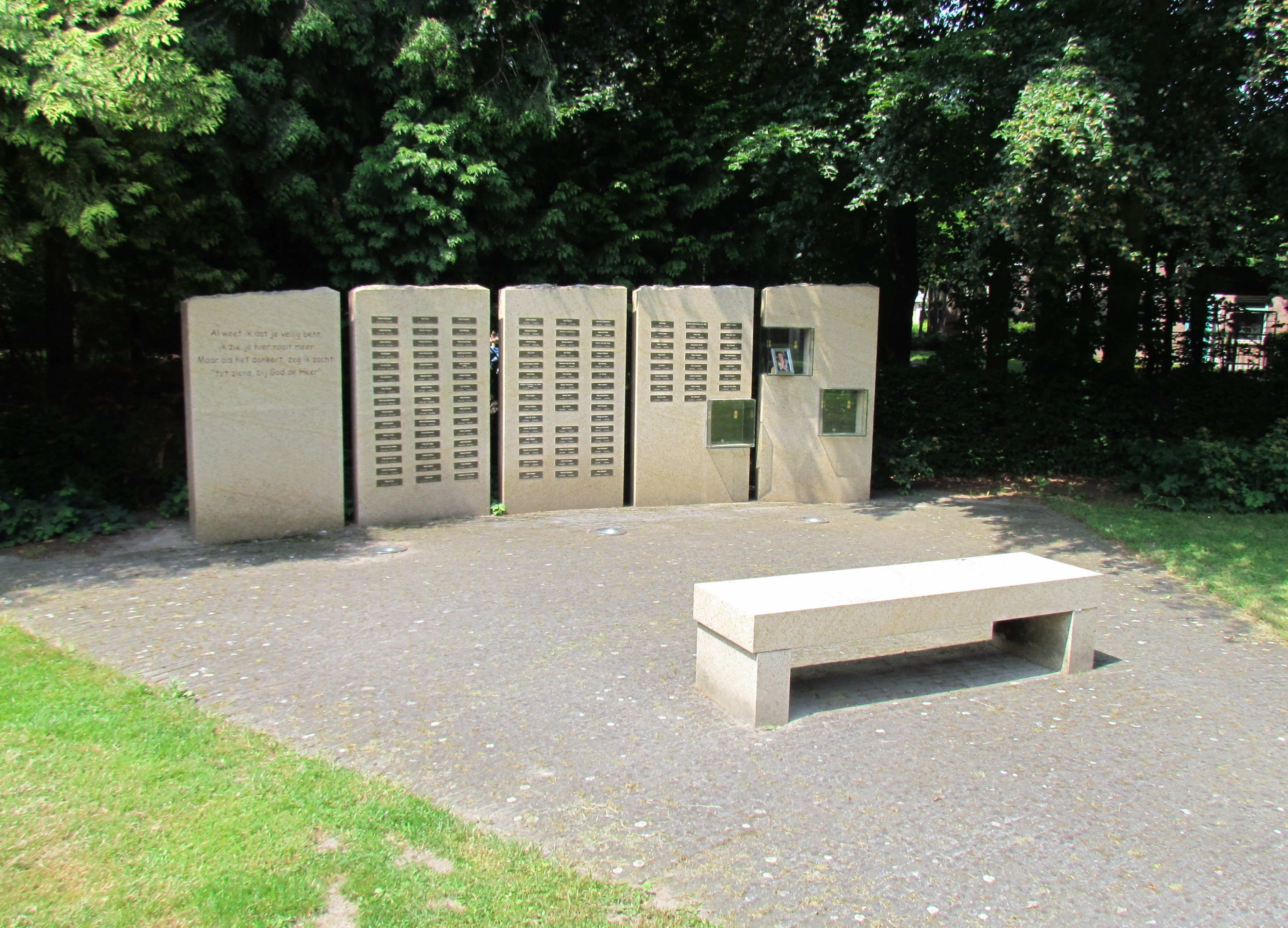 Het Apeldoornsche Bosch, herdenkingsmonument bij paviljoen G